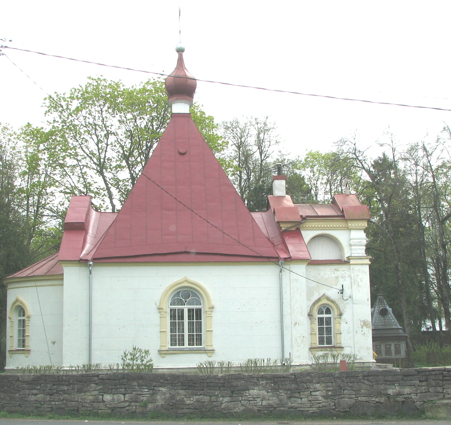 Aleksander Nevski õigeusu kirik Surnuaia tänav 1 Haapsalus